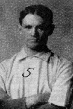 War Sanders